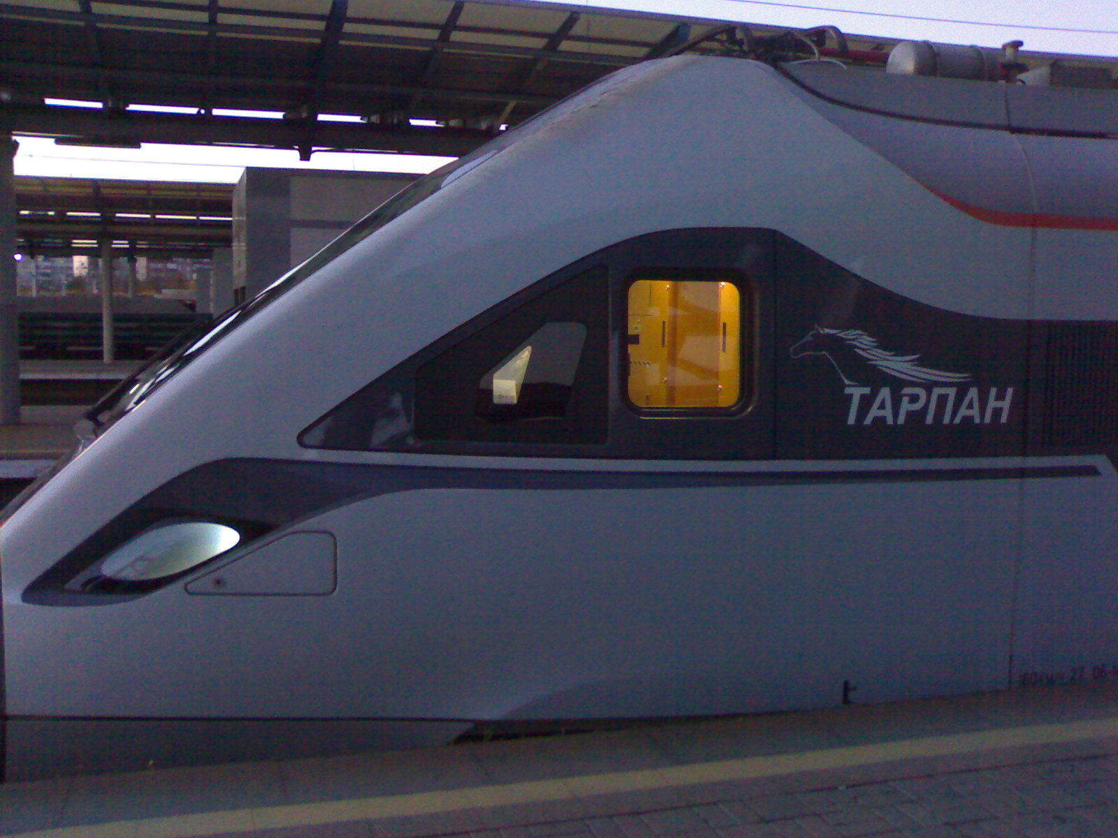 отправление "Тарпана"